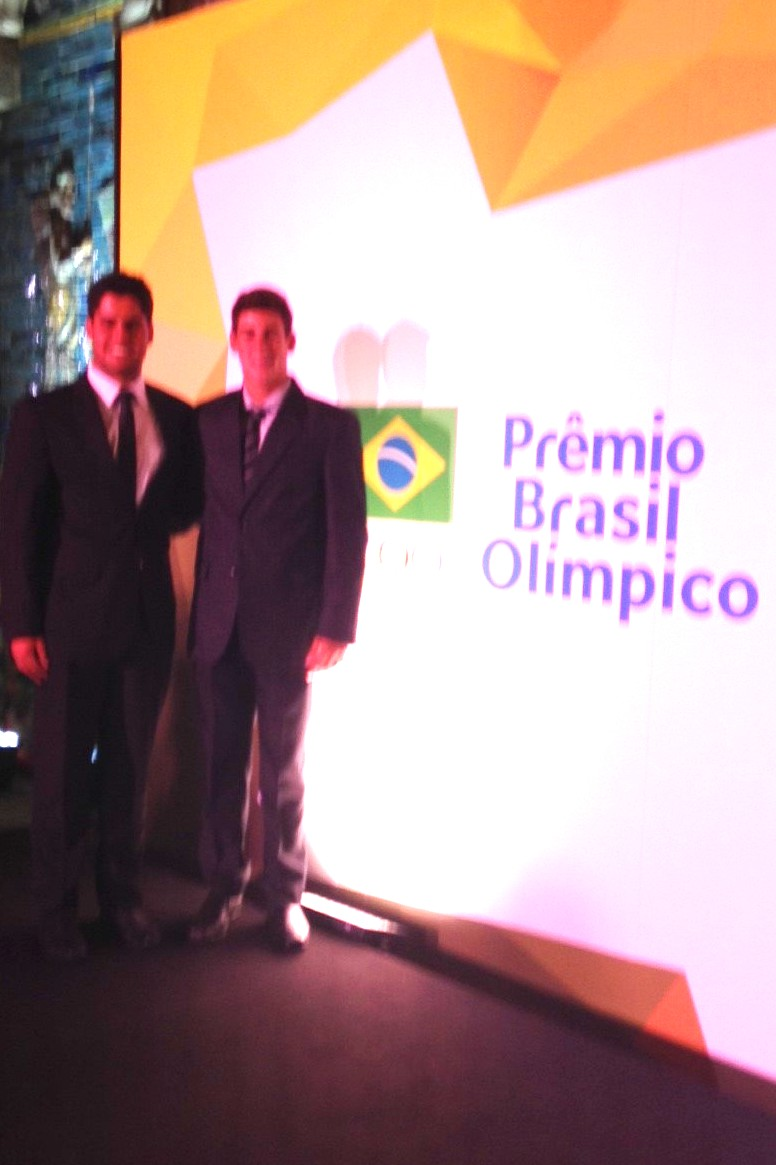 Zormann e Luz na entrega do Prêmio Brasil Olímpico